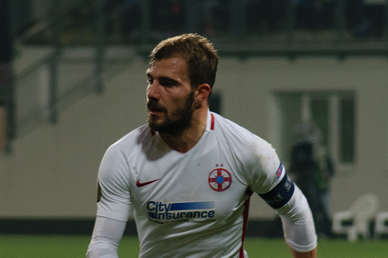 Mihai Bălașa